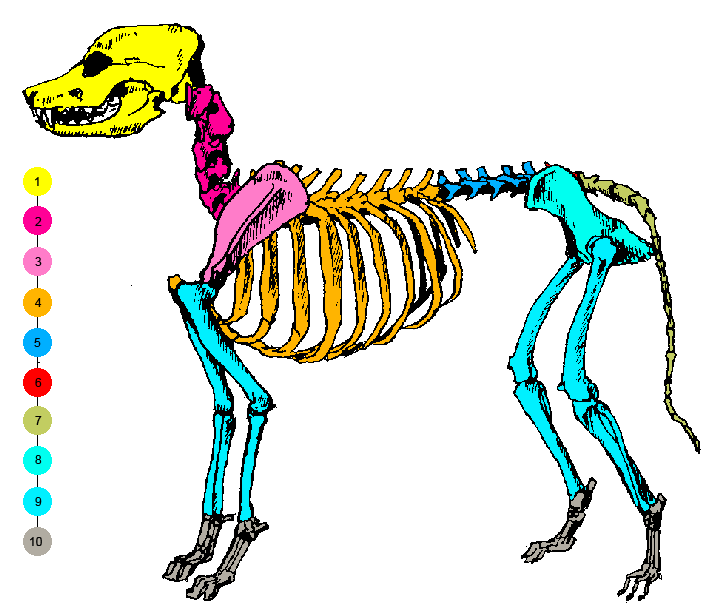 Dog skelton, sectional